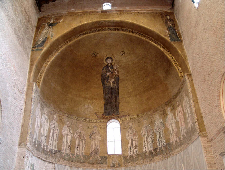 Torcello - Abside centrale